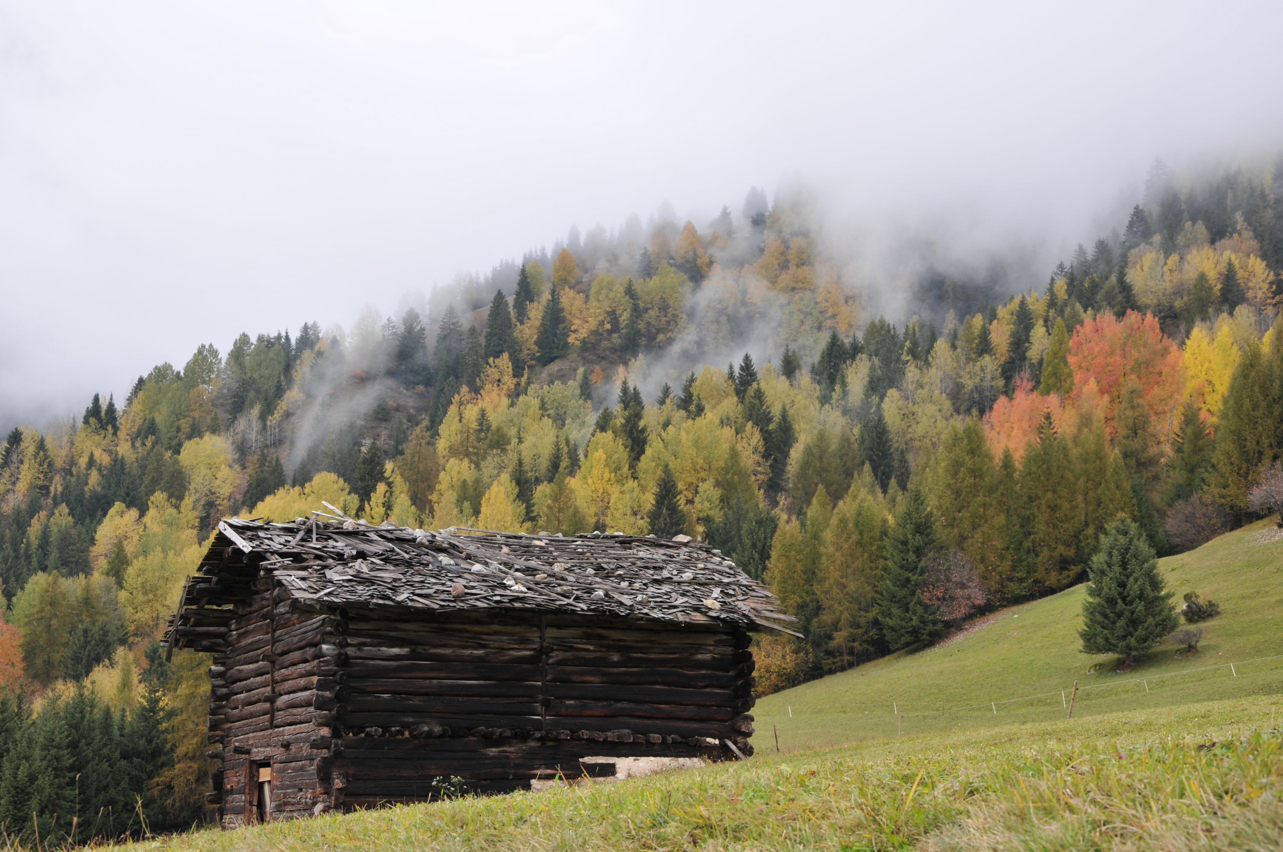 Scattata in Val di Fiemme, sulla strada per il Passo Rolle.